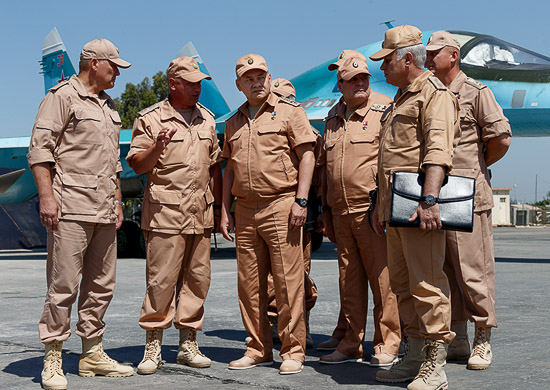 Инспектирование несения российскими военнослужащими боевой службы на авиабазе Хмеймим в Сирии Министром обороны Российской Федерации генералом армии Сергеем Шойгу